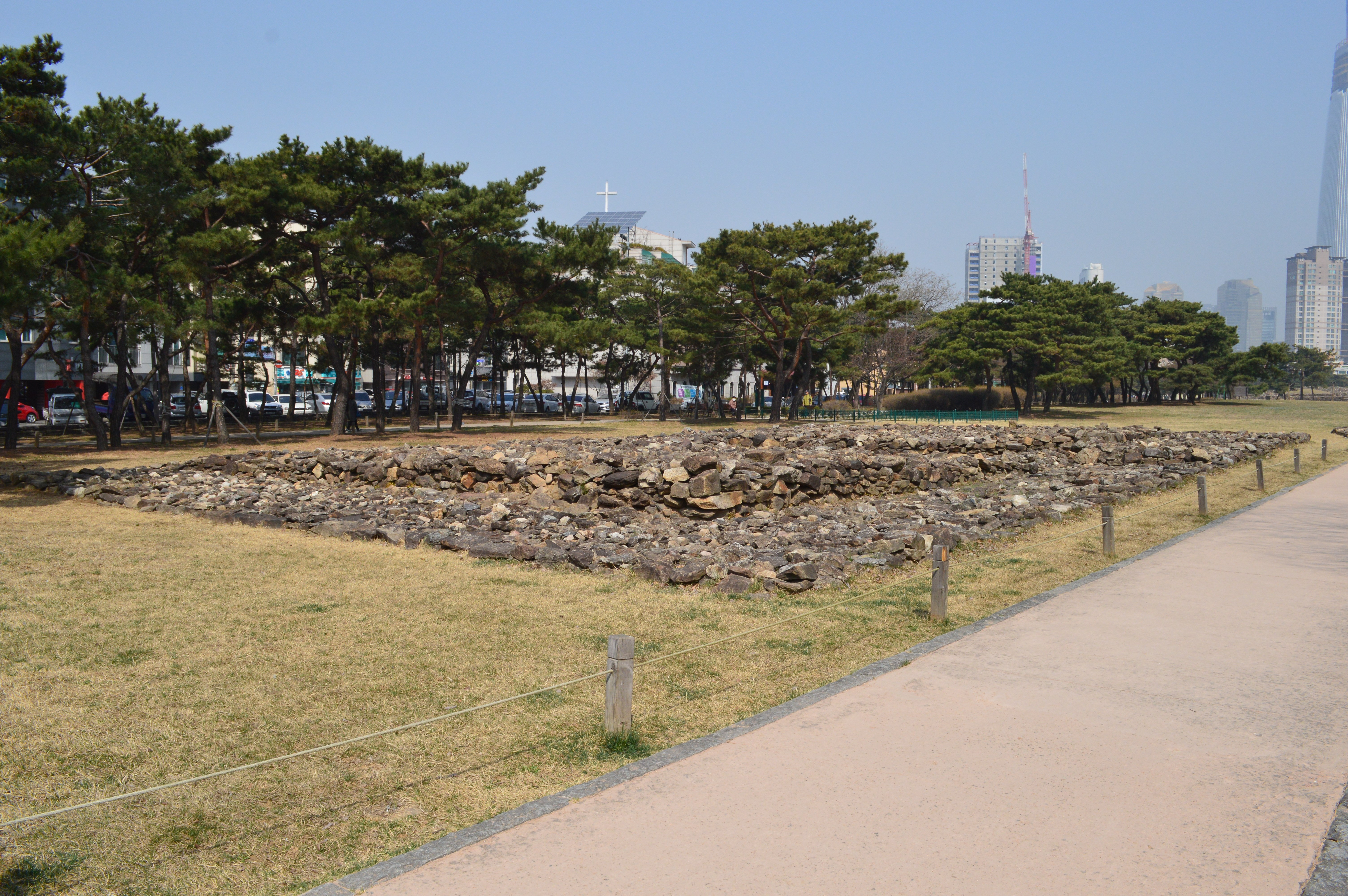 石村洞1号墳